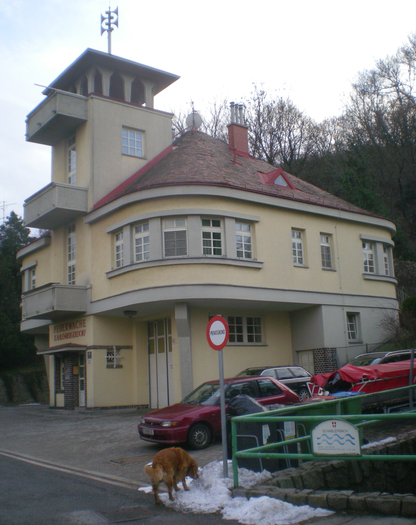 Feuerwache Kahlenbergerdorf in Wien-Döbling